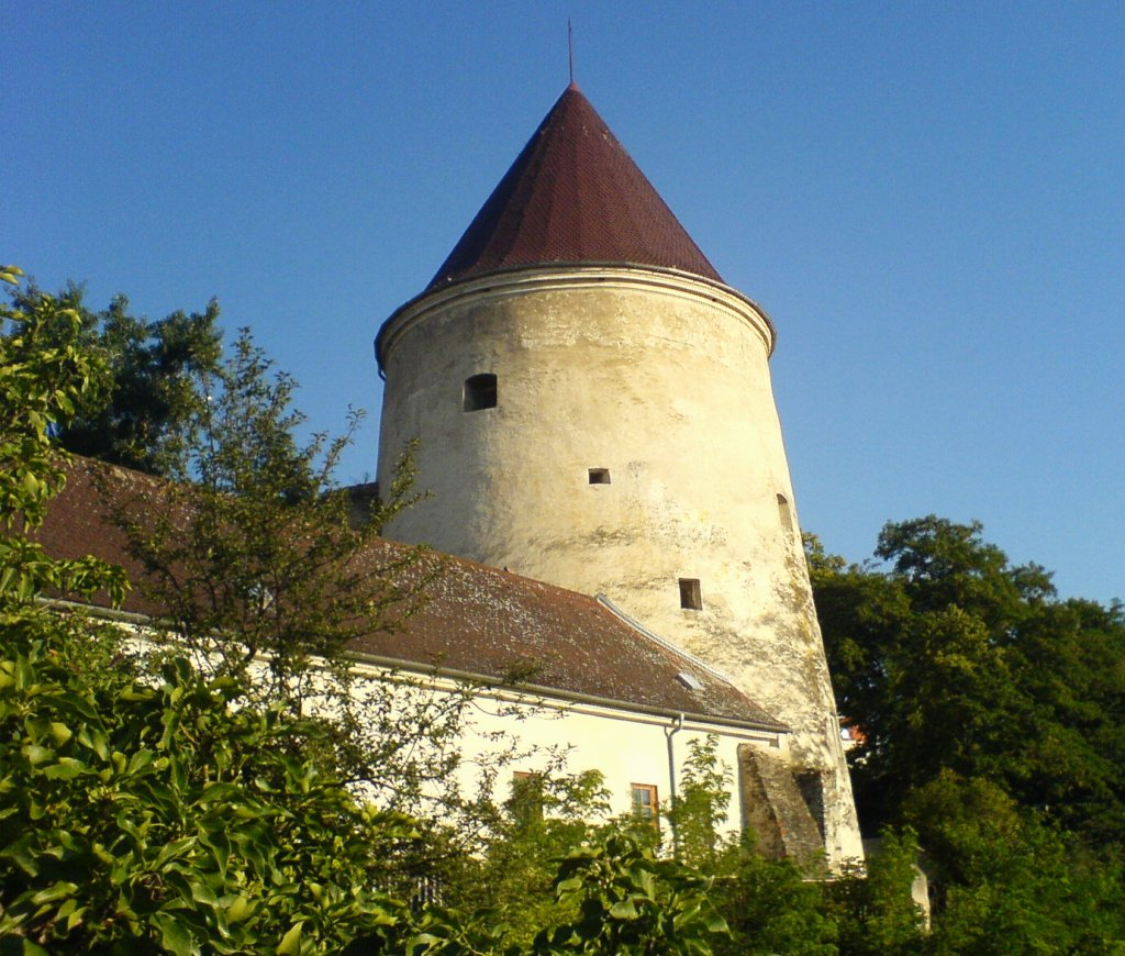 Pulverturm in Krems an der Donau